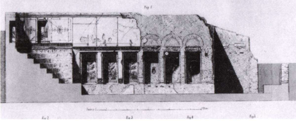 Disegno dell'auditorium mecenatis, 1874 circa